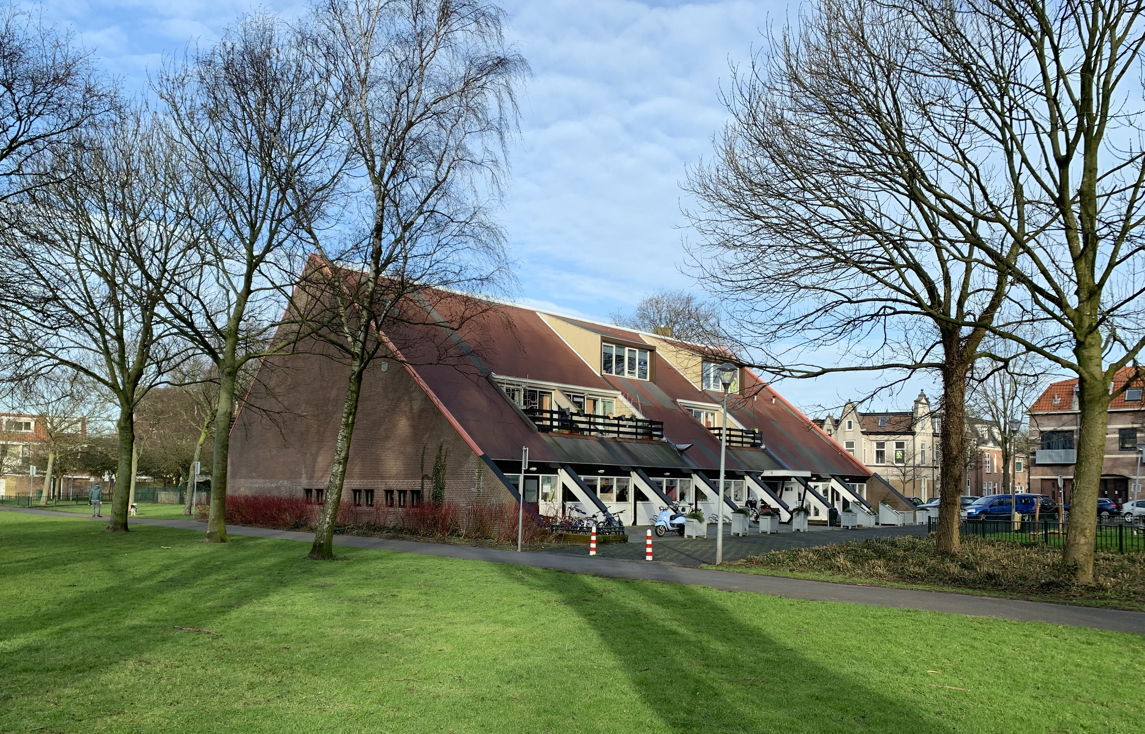 Wijk/buurtcentrum de Fjord in het Nelson Mandelapark in Haarlem, februari 2019